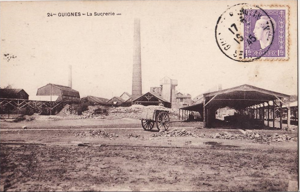 Carte postale ancienne de l'intérieur de la sucrerie de Guignes durant la première moitié du XXème siècle.